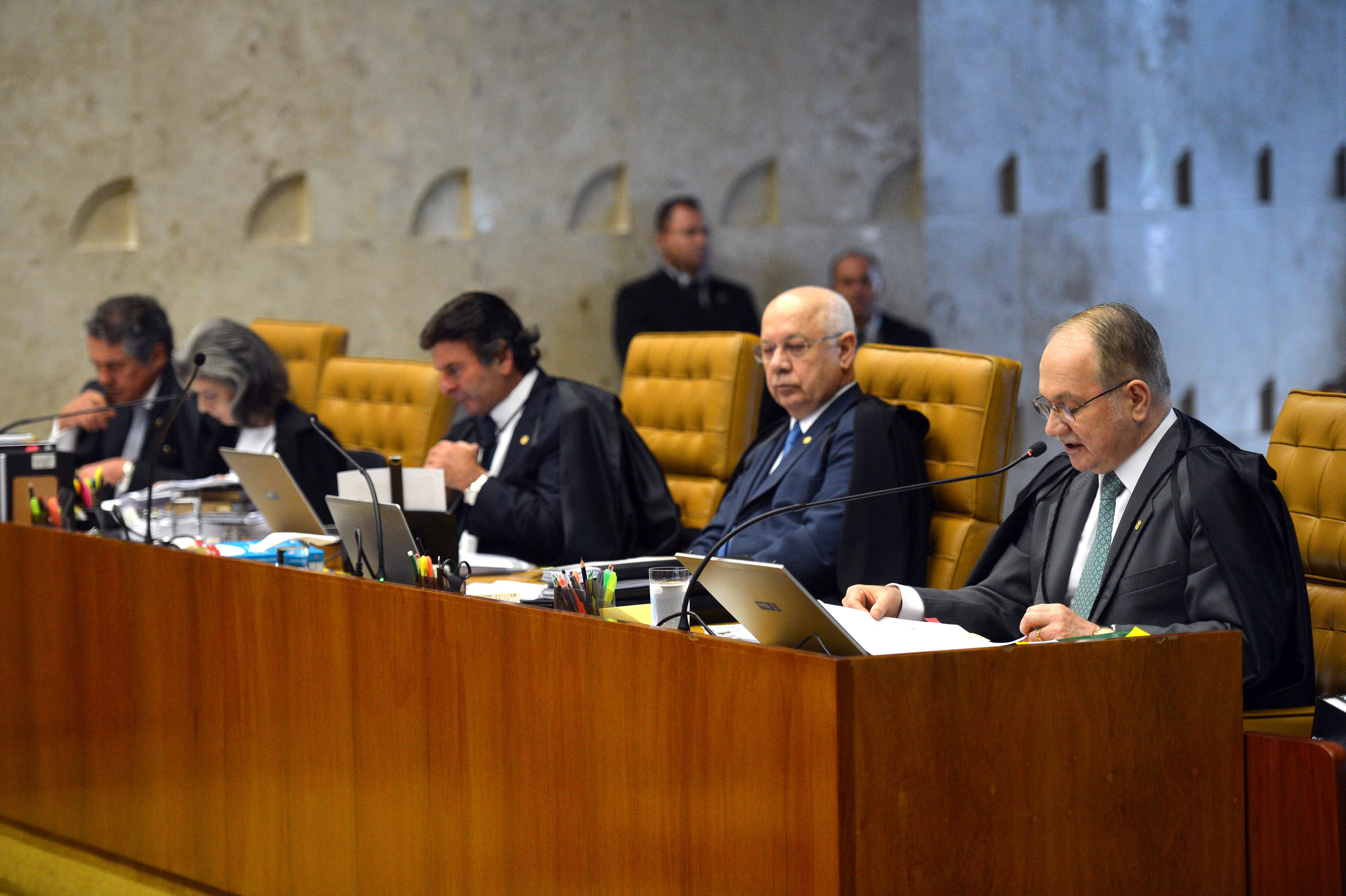 Ministros Marco Aurélio, Cármen Lúcia, Luiz Fux, Teori Zavascki e Edson Fachin durante sessão do STF para julgar como deve ser o rito de tramitação do processo de impeachment.